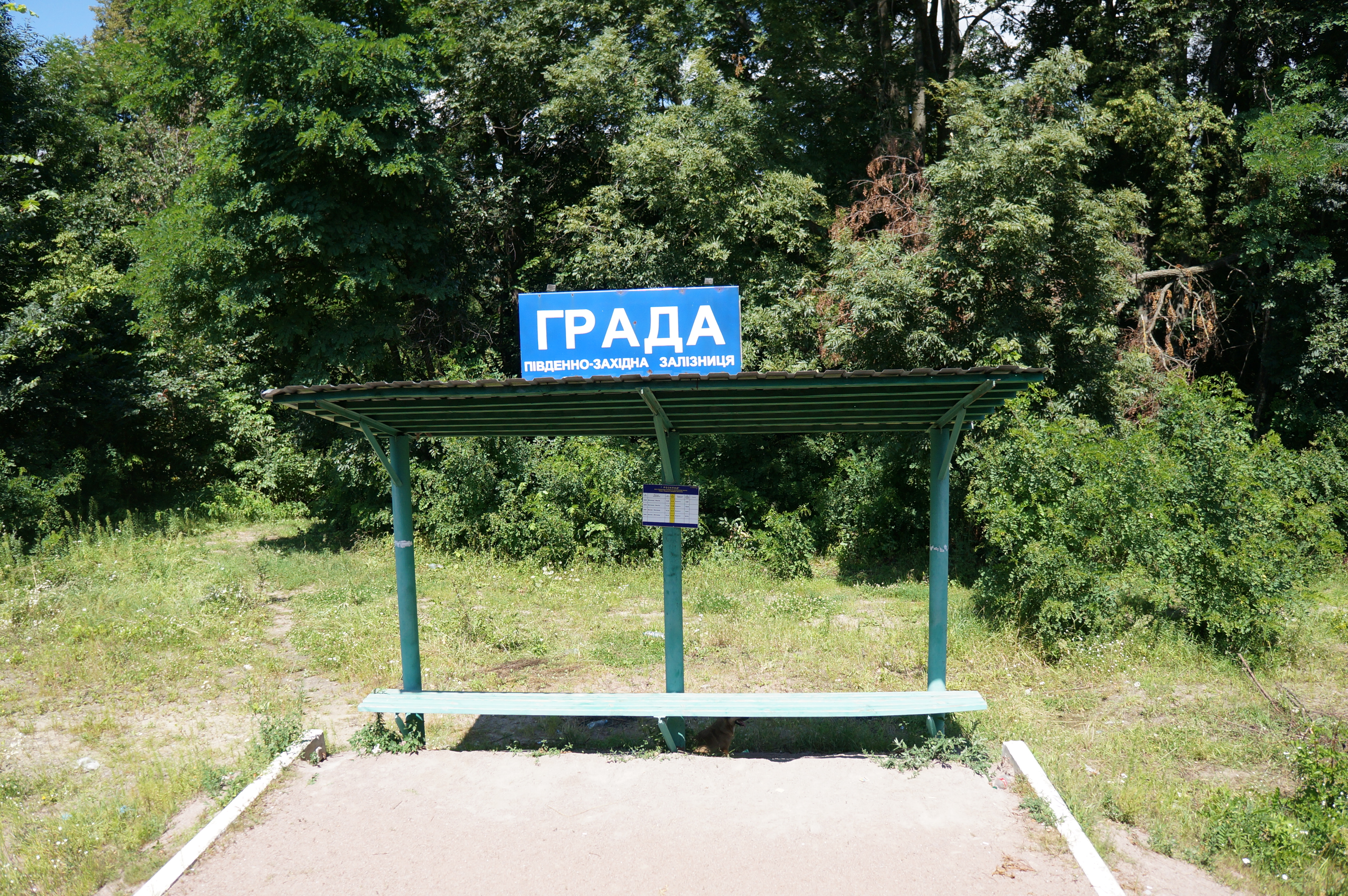 Зупинний пункт Града